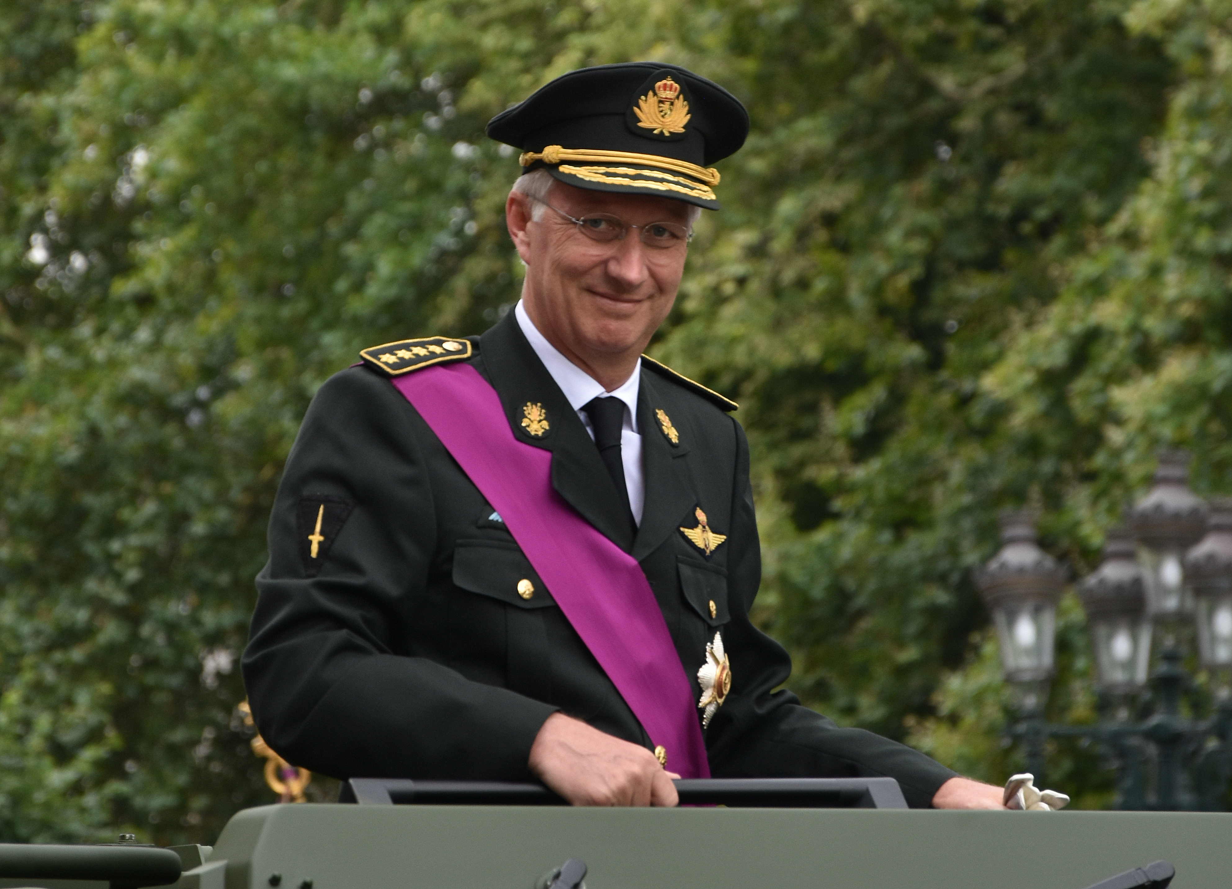 Koning Filip - Nationaal defilé 21 juli 2018 This photo of immaterial heritage has been taken in the Brussels Capital Region